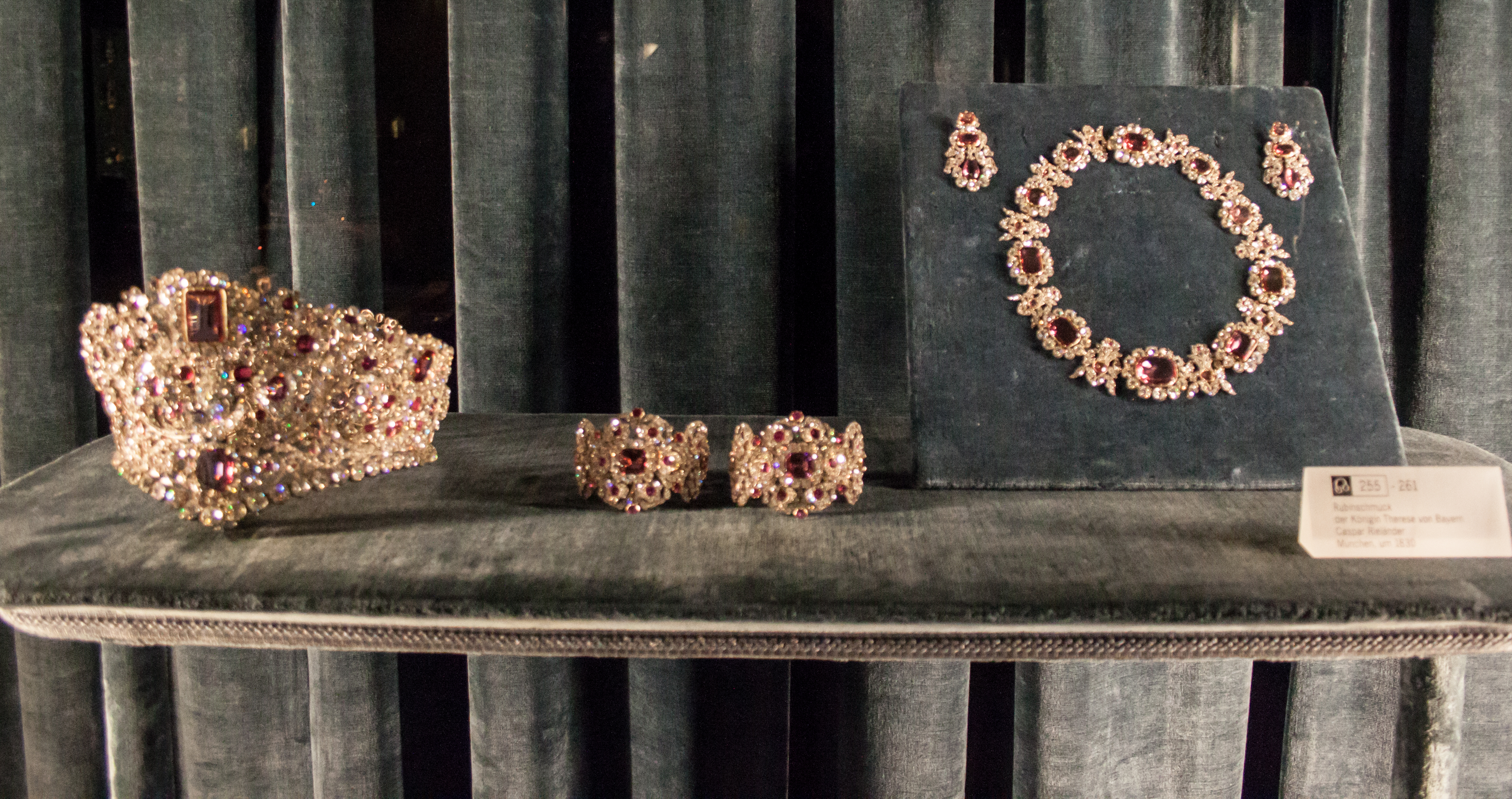 Rubinschmuck, Königin Therese von Bayern, 1830